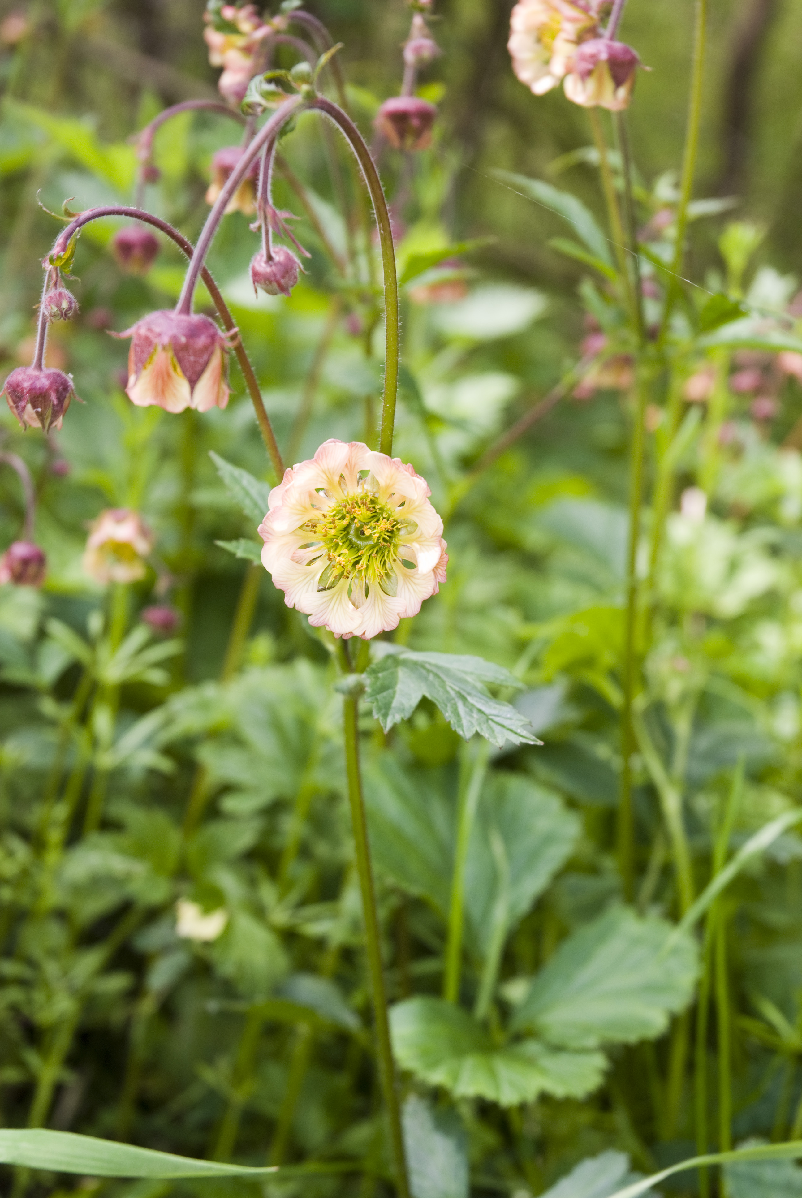 Geum rivale Inval-Boiron (Somme), France